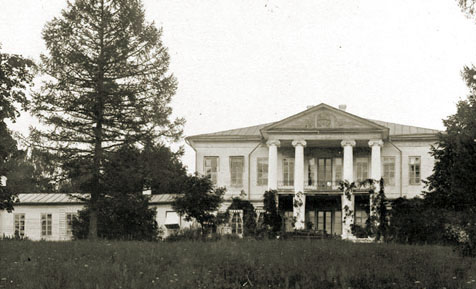 Усадьба Кутайсовых в селе Рождествено